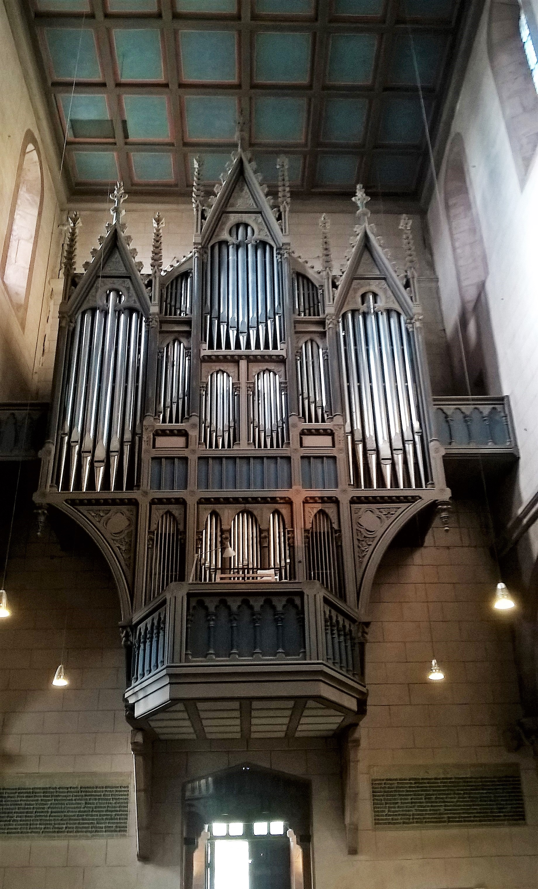 Orgel der Marienkirche Gelnhausen Main-Kinzig-Kreis, Hessen, Deutschland